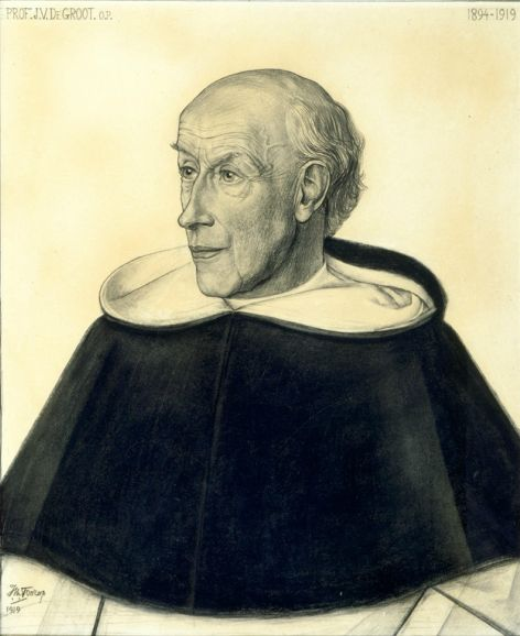 De hoogleraar thomistische wijsbegeerte J.V. de Groot, getekend door Jan Toorop in 1919, ter gelegenheid van zijn zilveren ambtsjubileum (1894-1919) aan de Amsterdamse Universiteit.